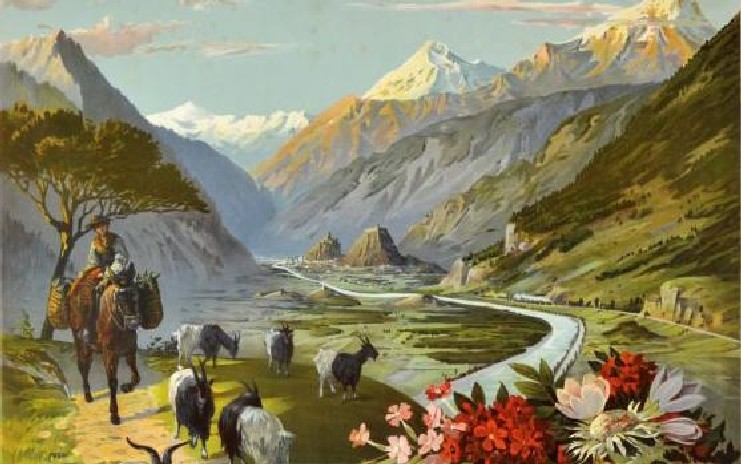 Eisenbahn im Rhonetal bei Sitten. Ausschnitt aus einem Plakat von F. Hugo d’Alési (1849-1906)